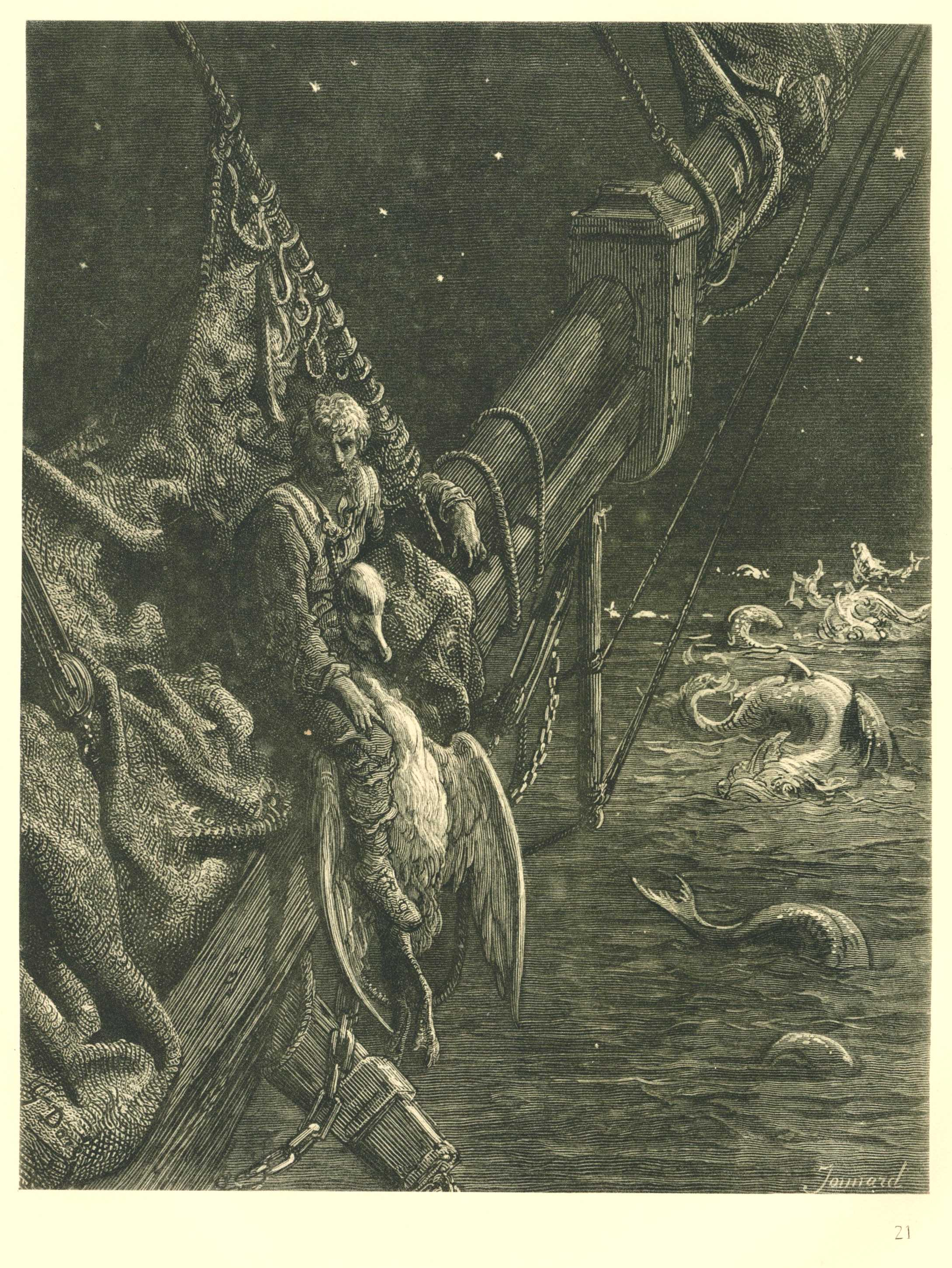 Und in des Schiffes Schatten sah ich große Wasserschlangen (Beschreibung lt. Quelle)